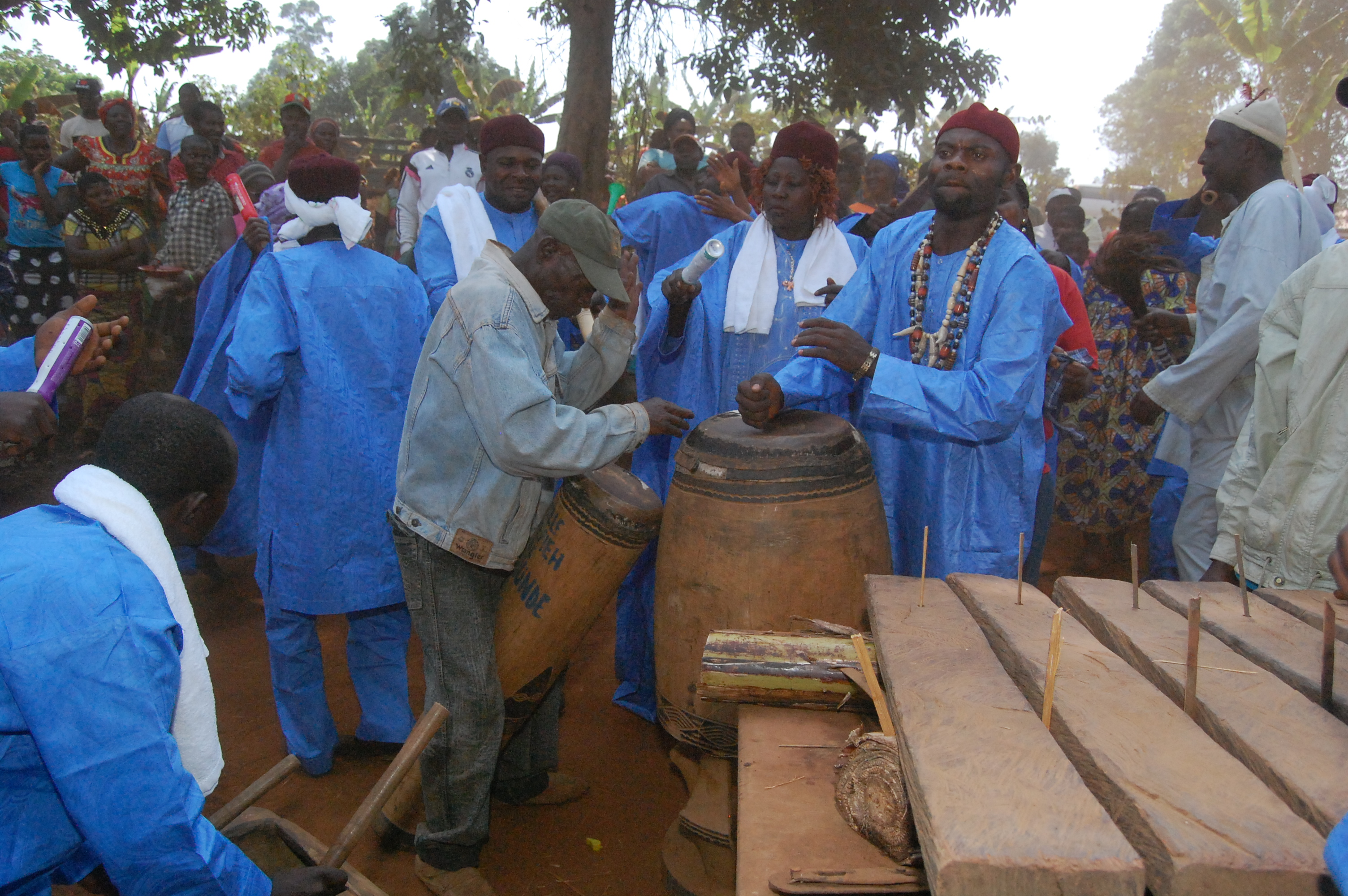 Pendant les funérailles en pays bamiléké This is an image from Cameroon